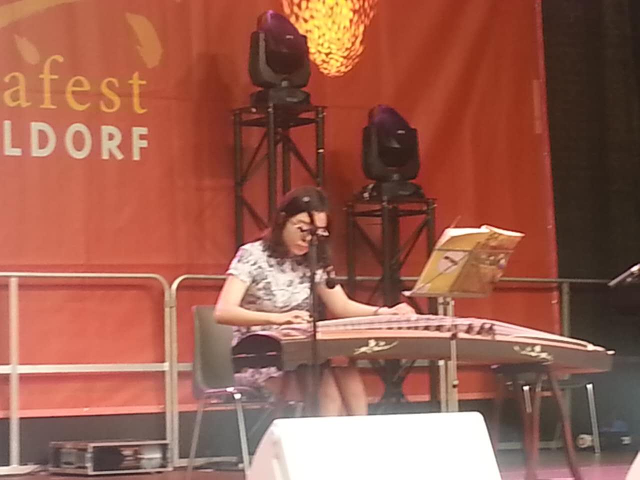 Chinafest Düsseldorf 2016 Guzhengspielerin